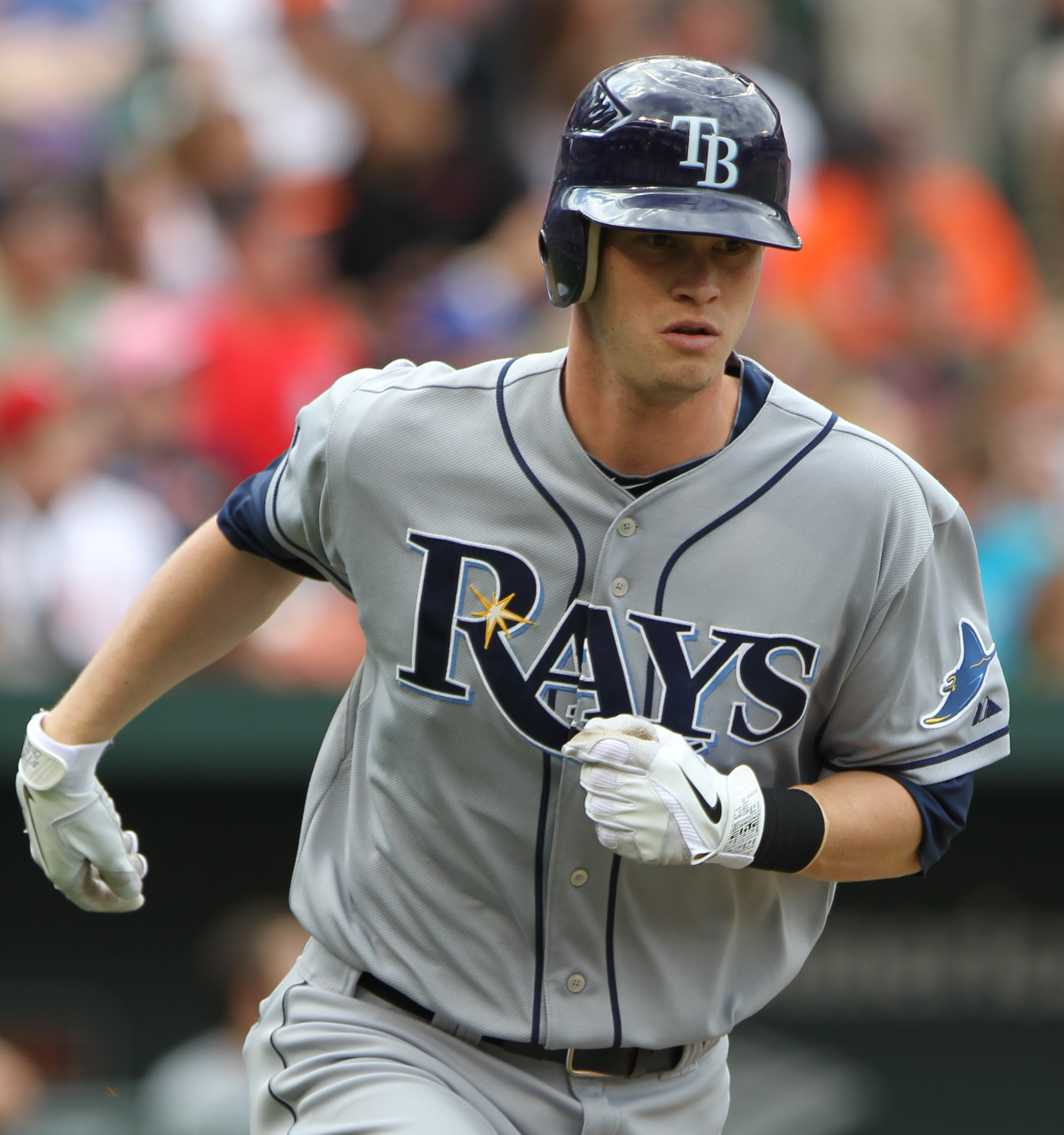 Reid Brignac